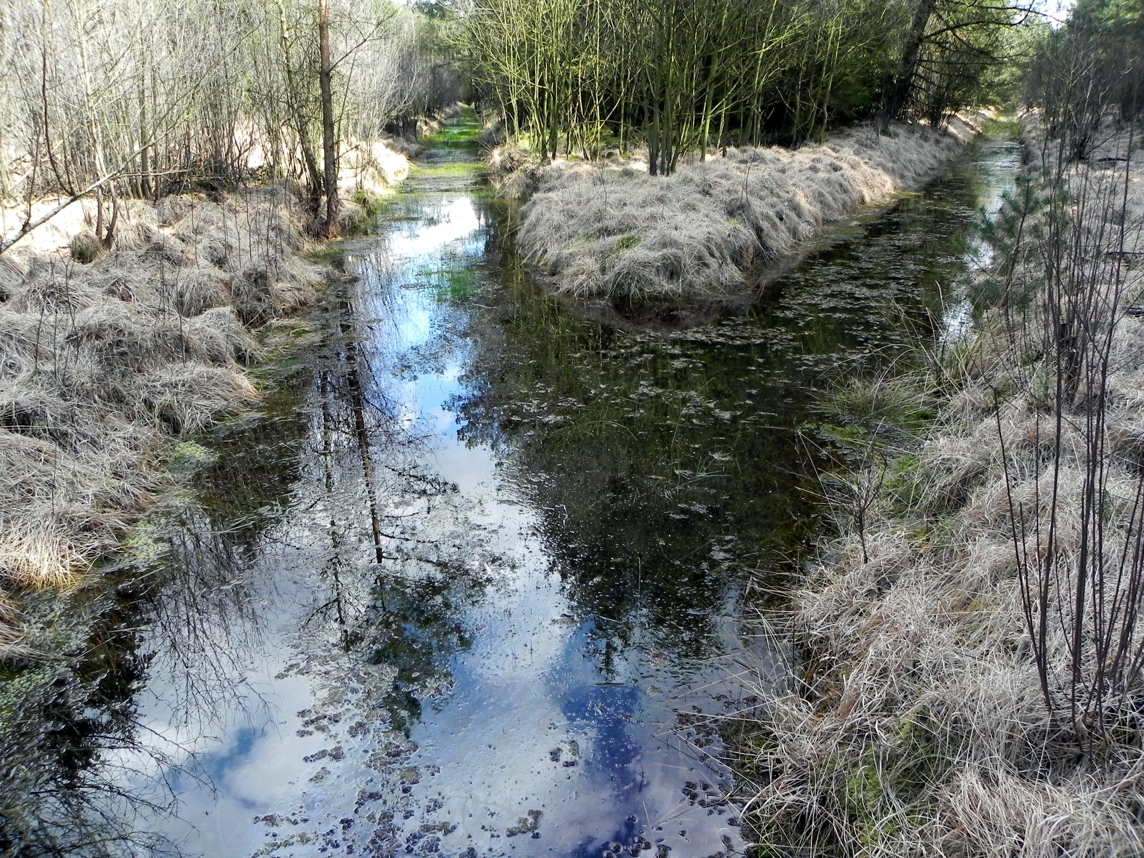 Ursprung der Schmarbeck, links vom Faßberg, rechts vom Breuerberg, Niedersachsen, Germany